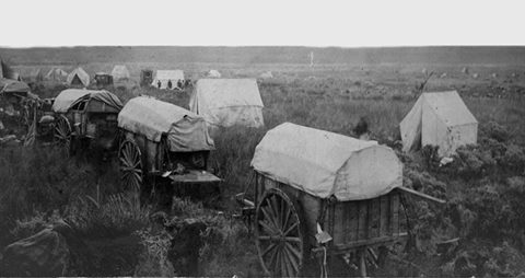 aprestos militares de la 2° división del ejército al mando del Cnel. Nicolás Levalle, rumbo a las Salinas Grandes.